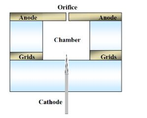 Schéma de fonctionnement d'un Sparkjet